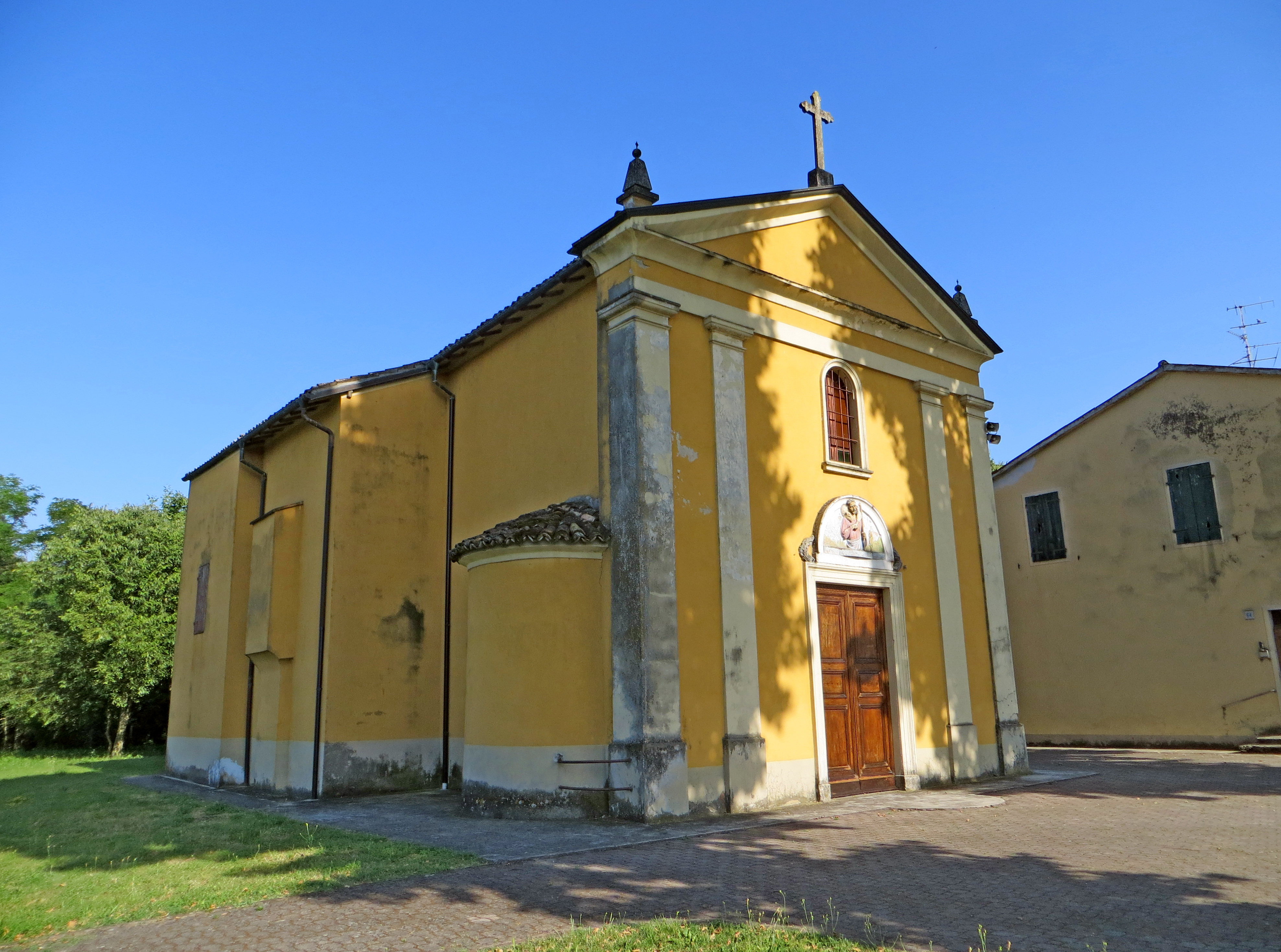 Chiesa di San Giacomo Apostolo (Vigheffio, Parma) - facciata e lato nord